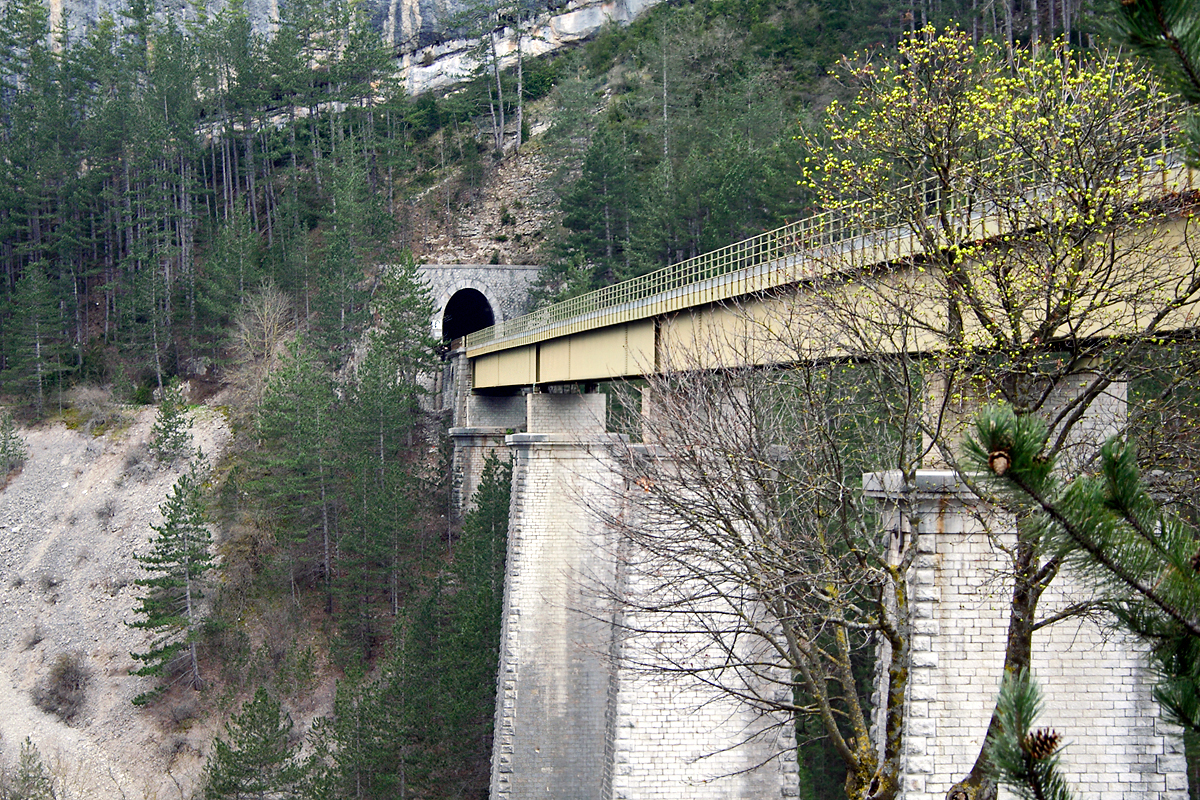 Viaduc du Claps (France-Drôme) - Ligne de Livron à Aspres-sur-Buëch - Commune de Luc-en-Diois